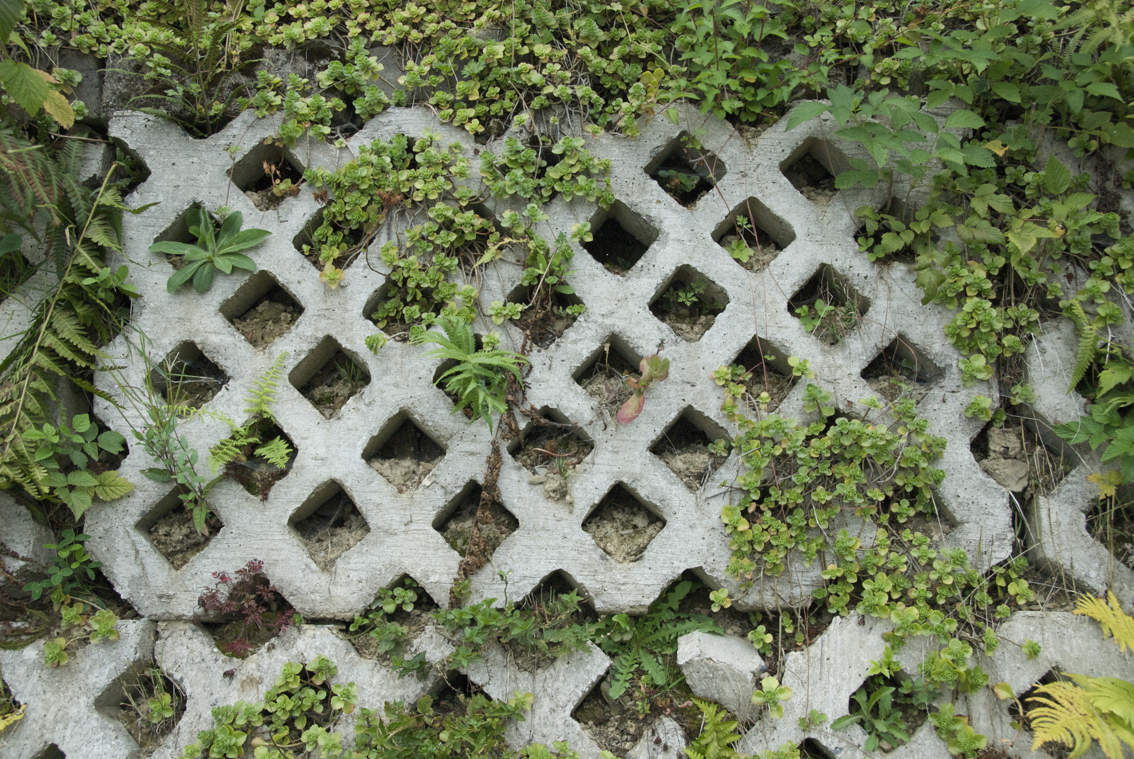 Rasengitterstein zur Sicherung einer Böschung